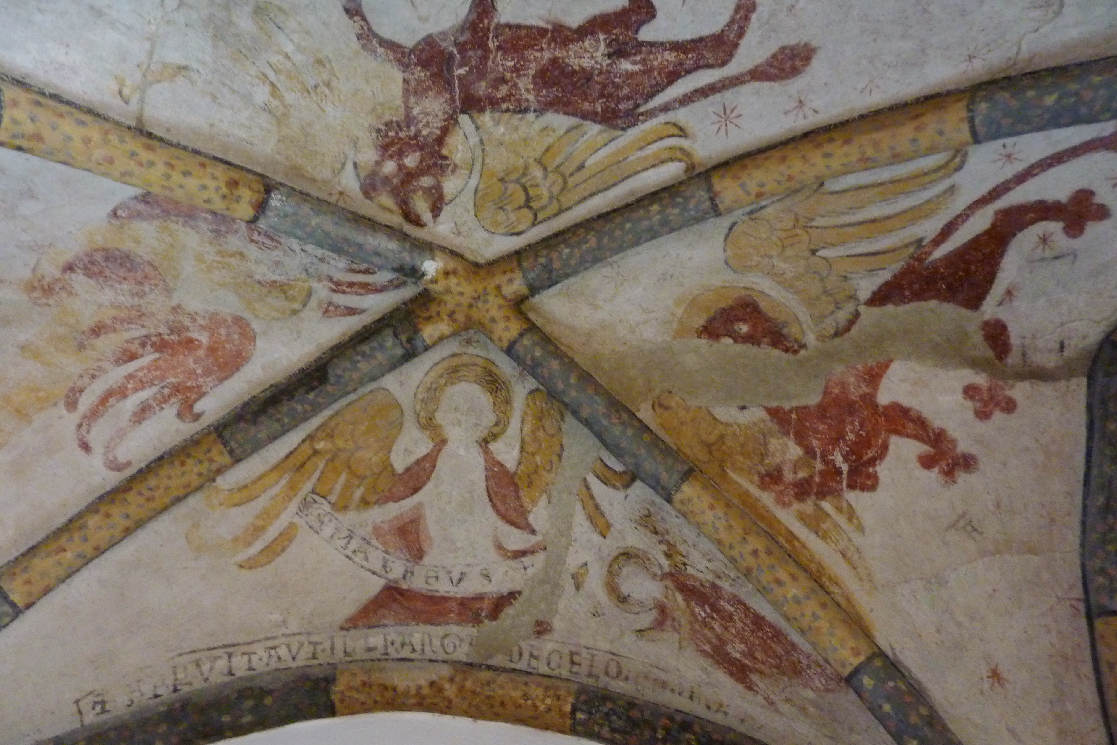 Evangelische Pfarrkirche in Winningen im Landkreis Mayen-Koblenz (Rheinland-Pfalz), Fresken am Gewölbe des Nebenchors, um 1230; Darstellung: Evangelistensymbole (Mensch, Löwe, Stier, Adler), mit Inschrift